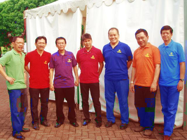 Chaseiro (1978-kini)